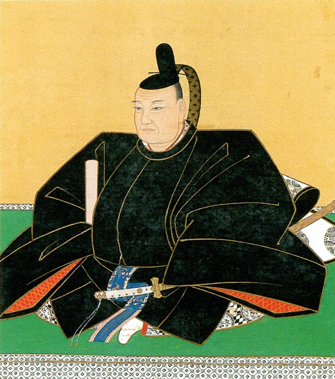 立花鑑通の肖像。